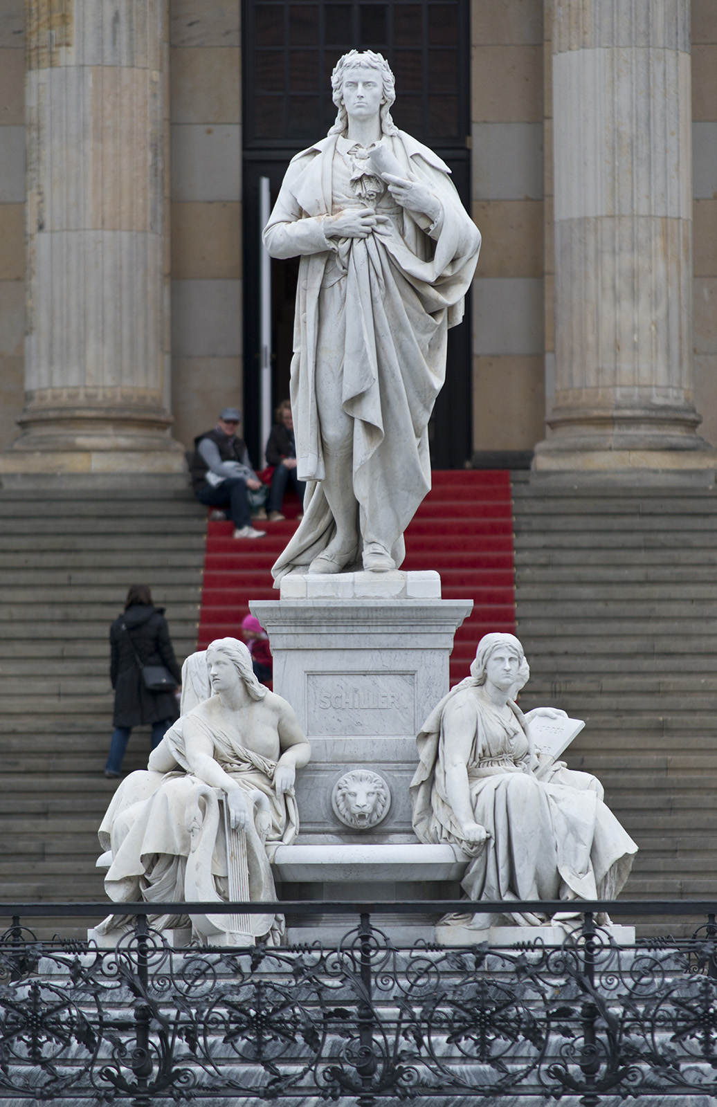 Gendarmenmarkt